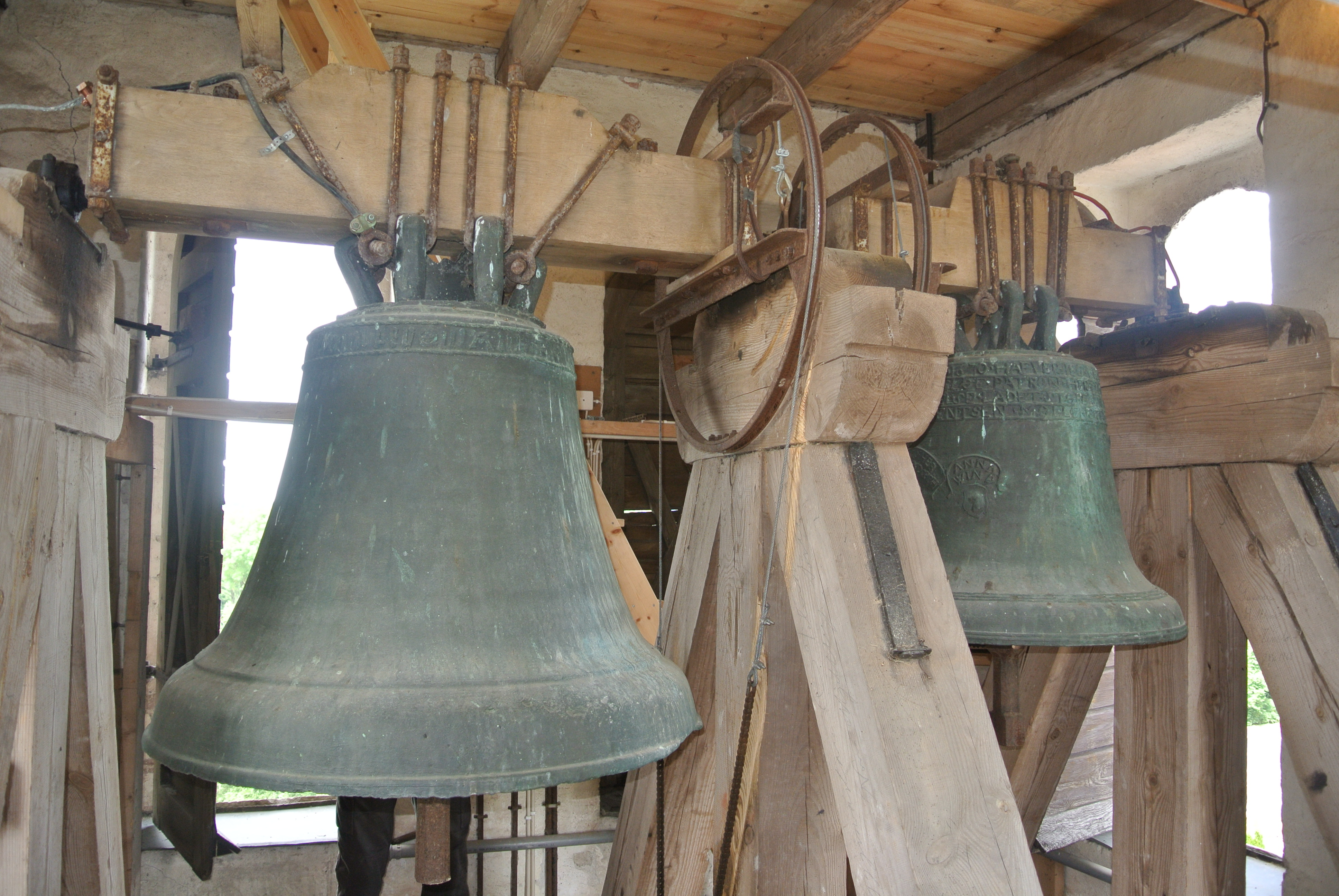 Storklockan till höger är gjuten år 1424 av Mäster Johannes och lillklockan till vänster är gjuten år 1670 i Malmö av Christopher Ludovic